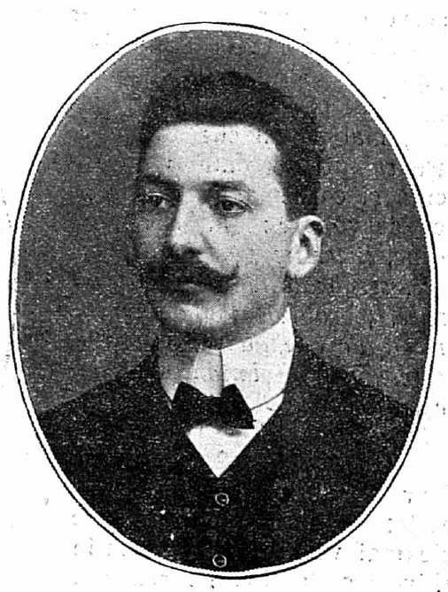 Eugeniu Czell - industriaş (România), 1910